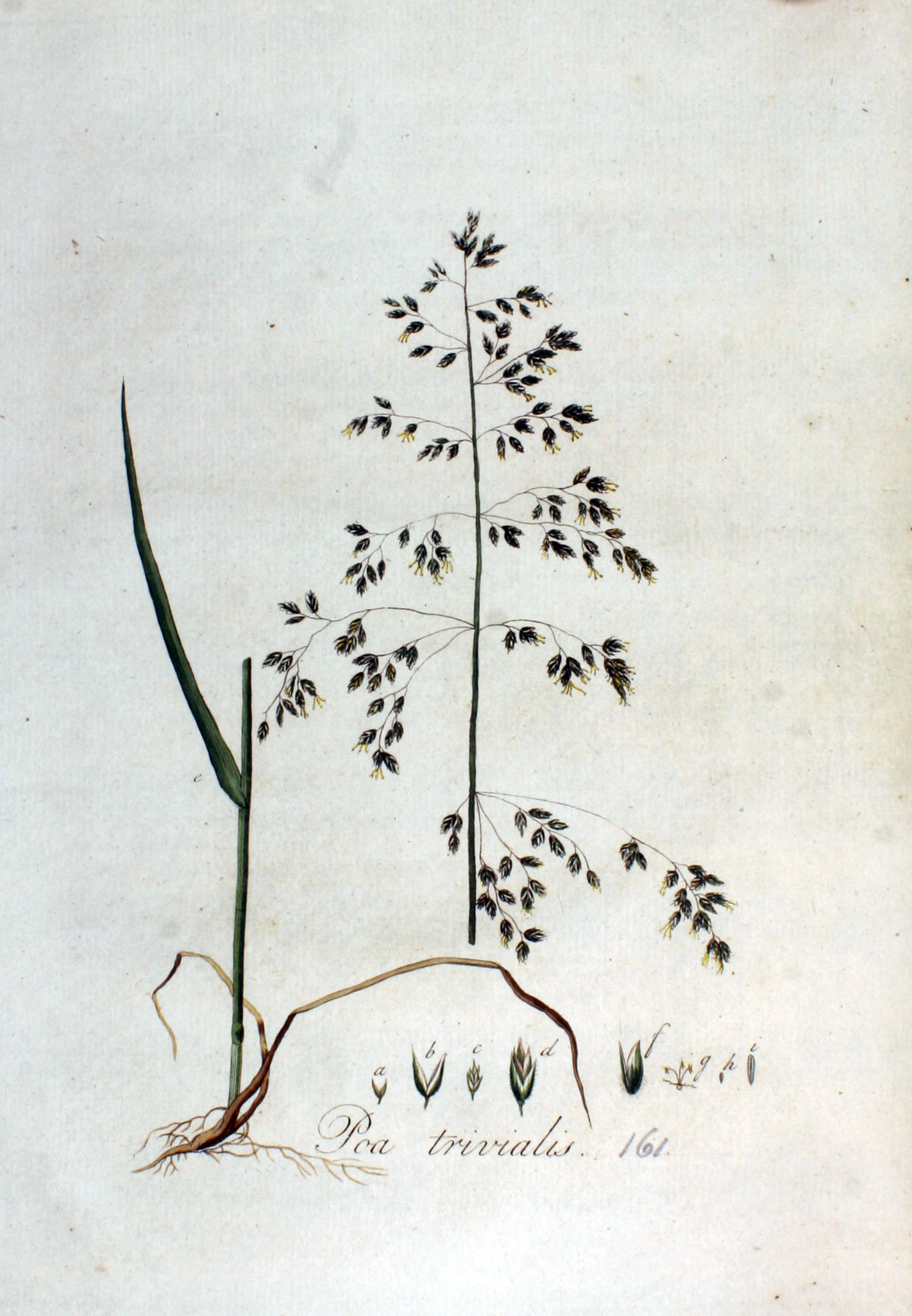 Poa trivialis L.